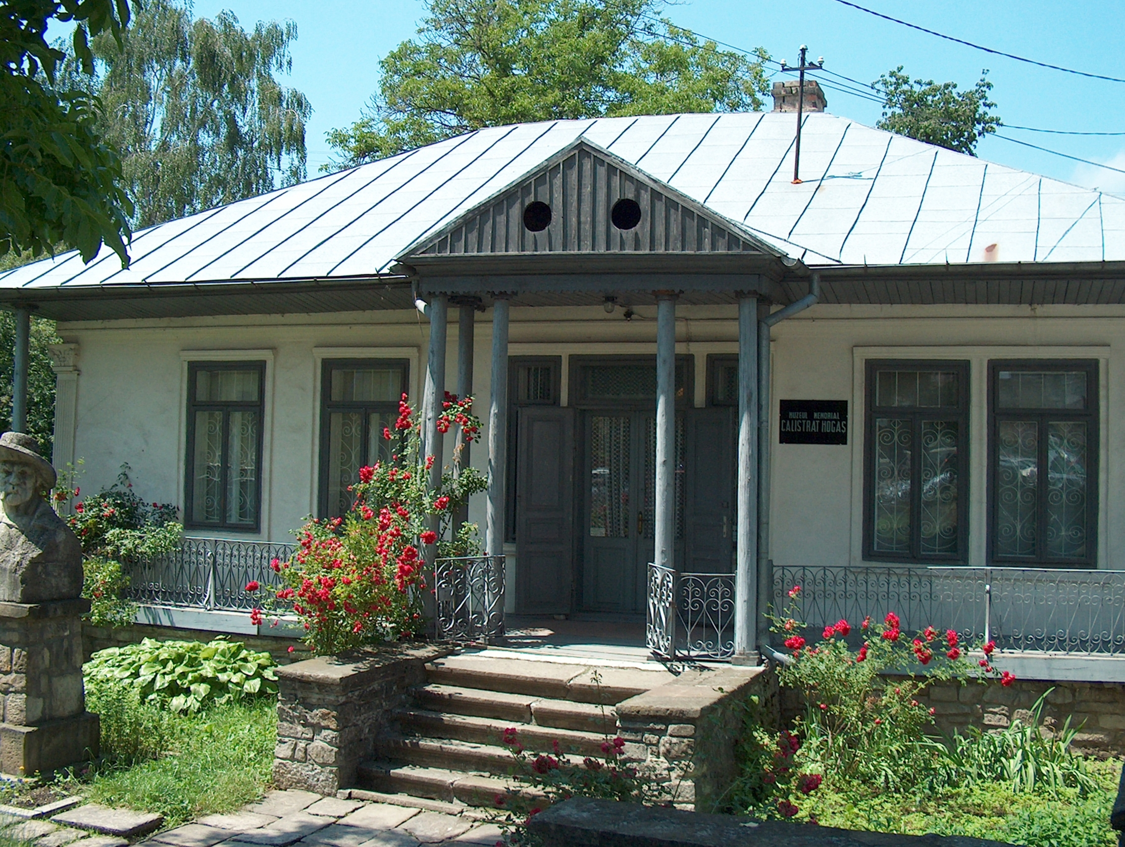 Casa memorială Calistrat Hogaş, Piatra Neamţ